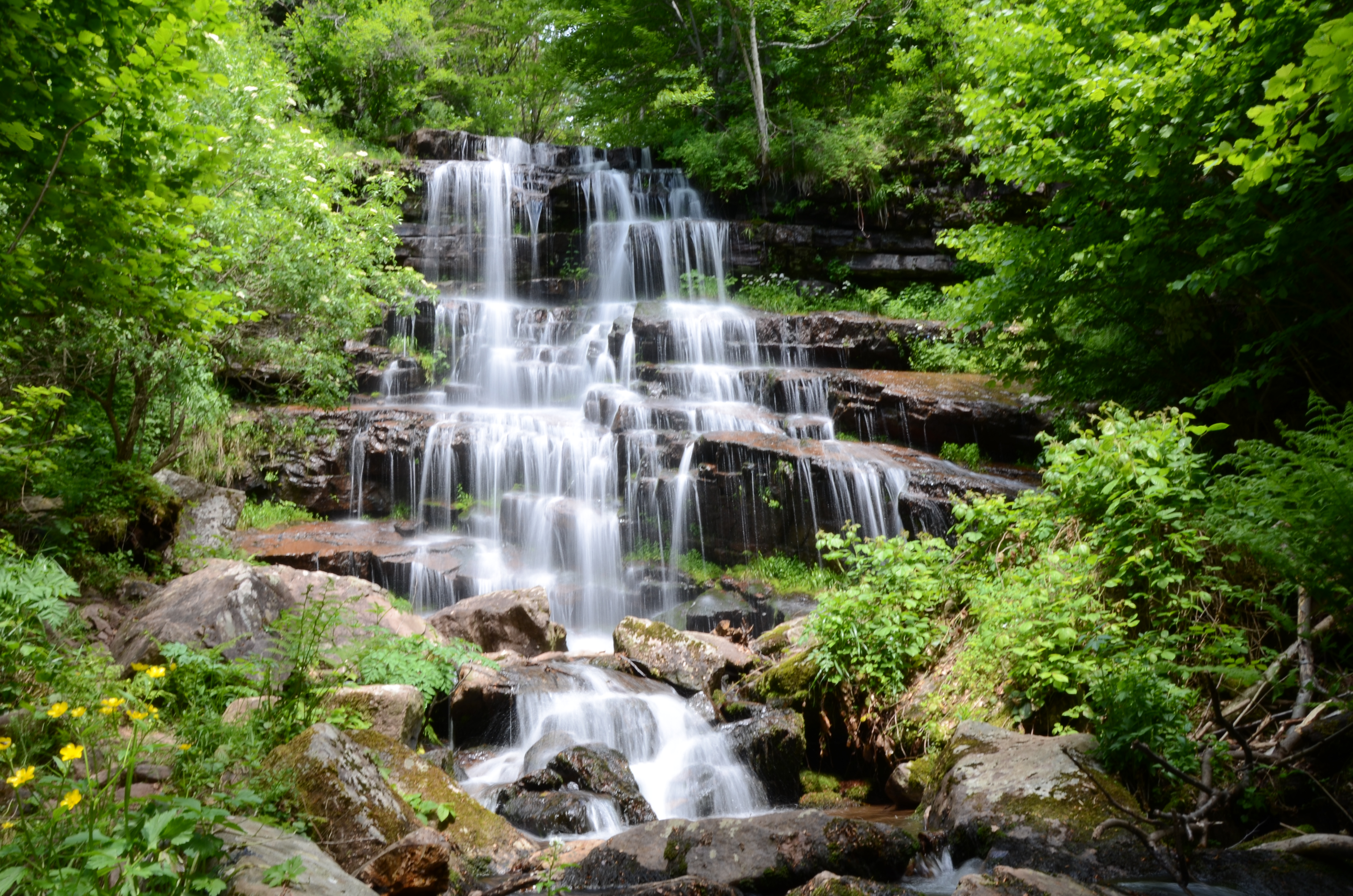 Српски (ћирилица): Ово је фотографија заштићеног природног добра у Србији под шифром: ПП16This is a a photo of a natural area in Serbia with ID: ПП16 Водопад Тупавица на Старој планини налази се у близини села Дојкинци на 1050 метара надморске висине. Висина водопада је око 15 метара.